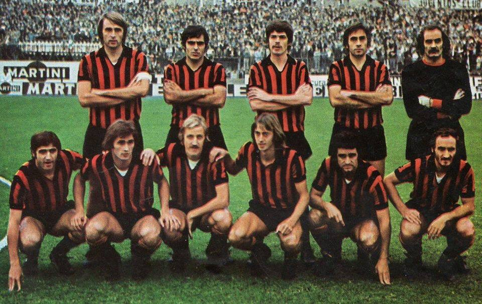 A line-up of U.S. Foggia in the 1973–74 season. From left to right, standing: G. Pirazzini (captain), M. Colla, F. Liguori, N. Bruschini, R. Trentini; crouched: G. Pavone, S. Villa, L. Delneri, G. Rognoni, L. Villa, P. Valente.